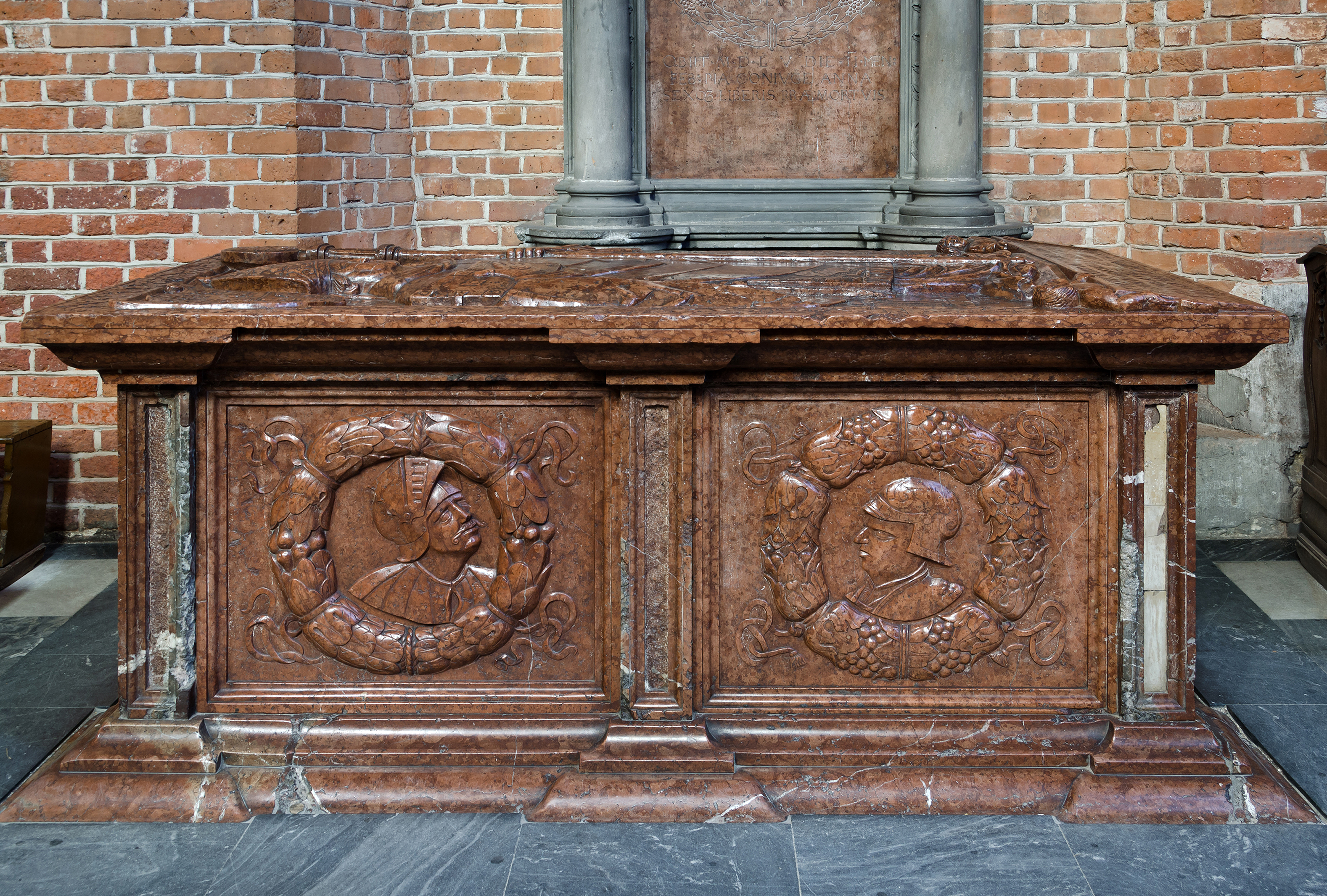 Nysa, kościół par. p.w. św. Jakuba Starszego i św. Agnieszki, 1430, XIX, po 1945